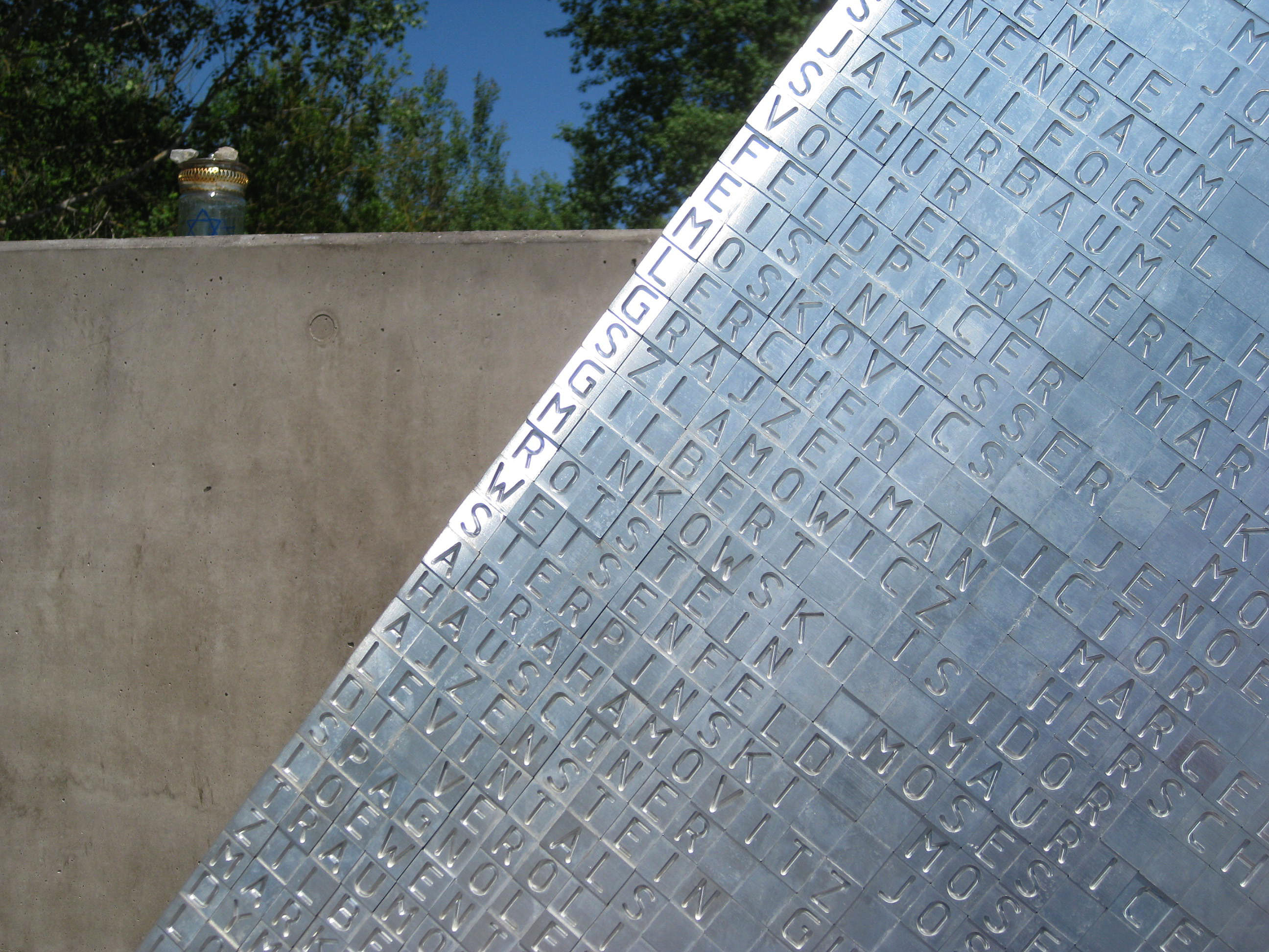 Mahnmal für die Gedenkstätte des KZ-Außenlager Hailfingen/Tailfingen, - Detail -, Gestaltung: Rudolf Kurz, 2010, Deutschland, Baden-Württemberg, auf der Kreisgrenze der Landkreise Tübingen und Böblingen